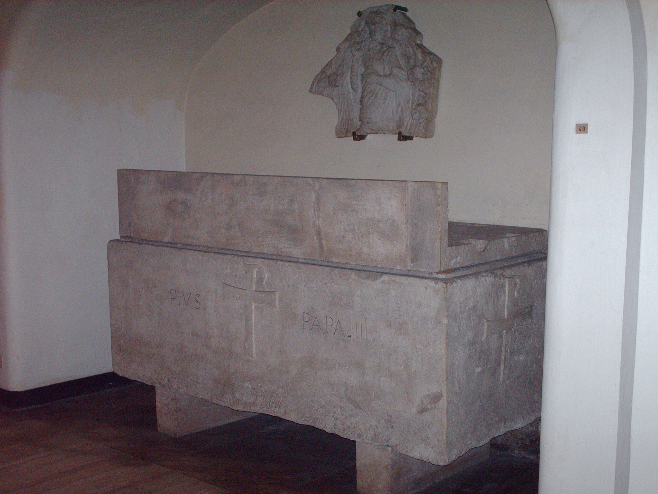 Tomb of pope Pius III, "grotte vaticane", Basilica di San Pietro